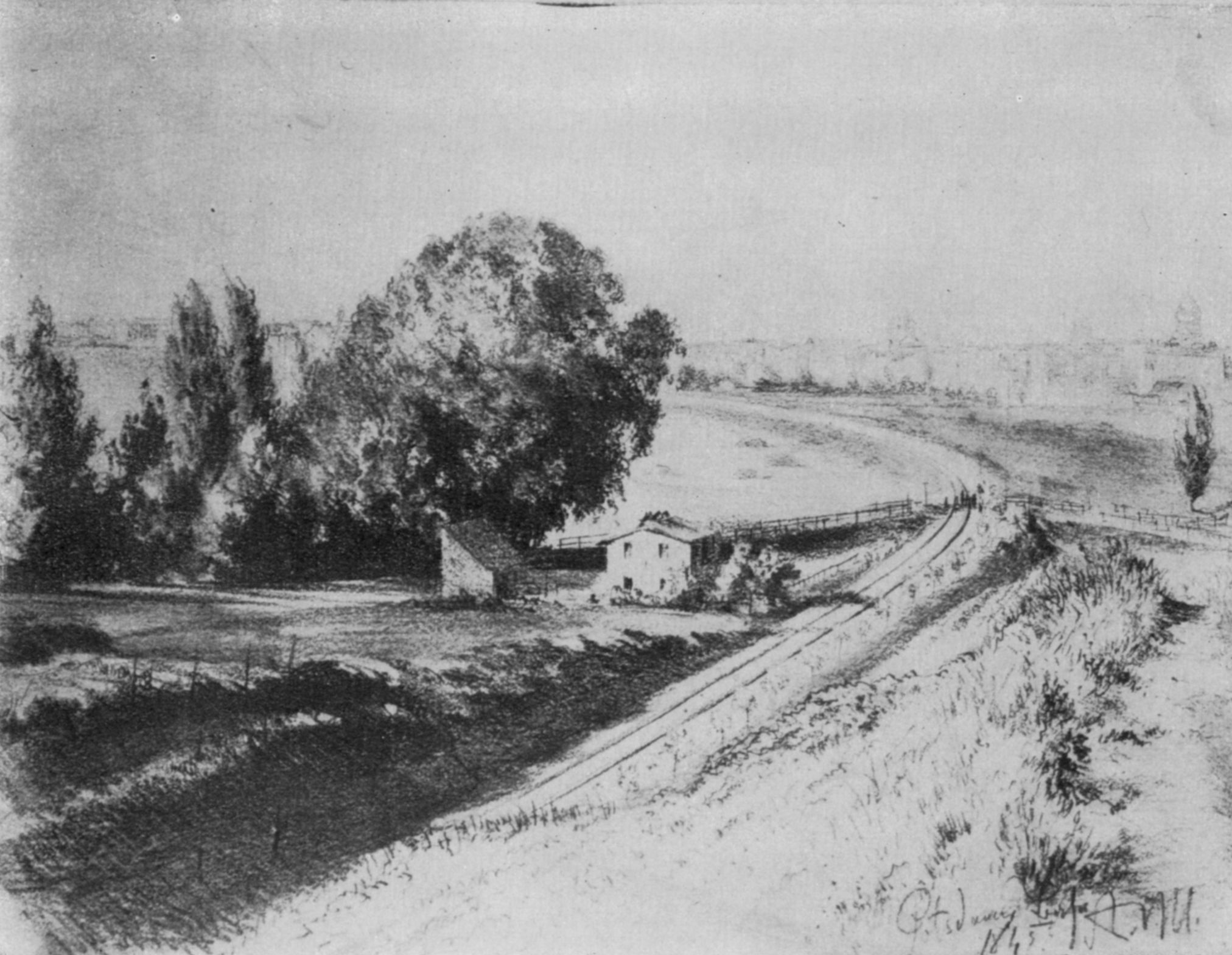 Adolph von Menzel: Skizze zum Bild die Berlin-Potsdamer Eisenbahn, Bleisiftzeichnung, Blattmaß: 20,1 x 26,1 cm